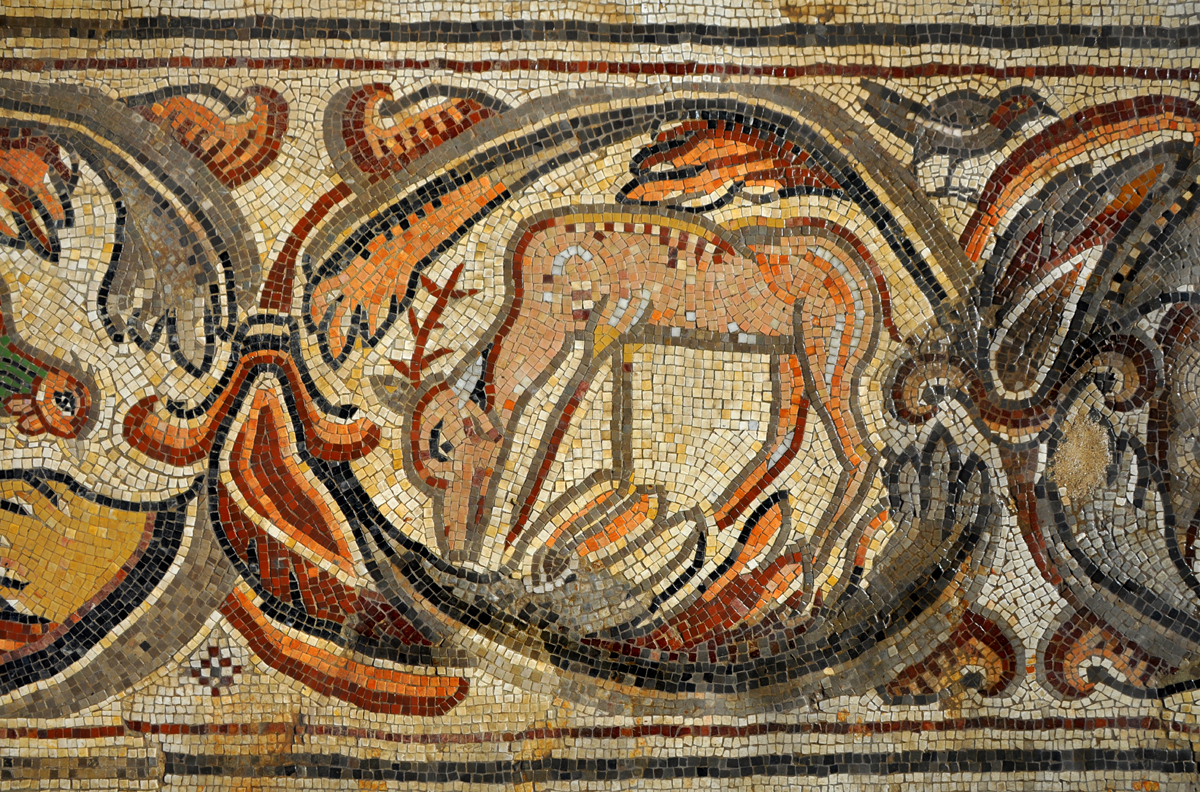 כנסייה מהתקופה הביזנטית ששרידיה נמצאו בשנת 1964 בשכונת "גבעת כצנלסון" בנהריה. שרידי הכנסייה מהמאה השישית כללו רצפת פסיפס הכוללת דמויות אדם ודמויות מעולם החי והצומח ודגמים גאומטריים. פסיפס אייל